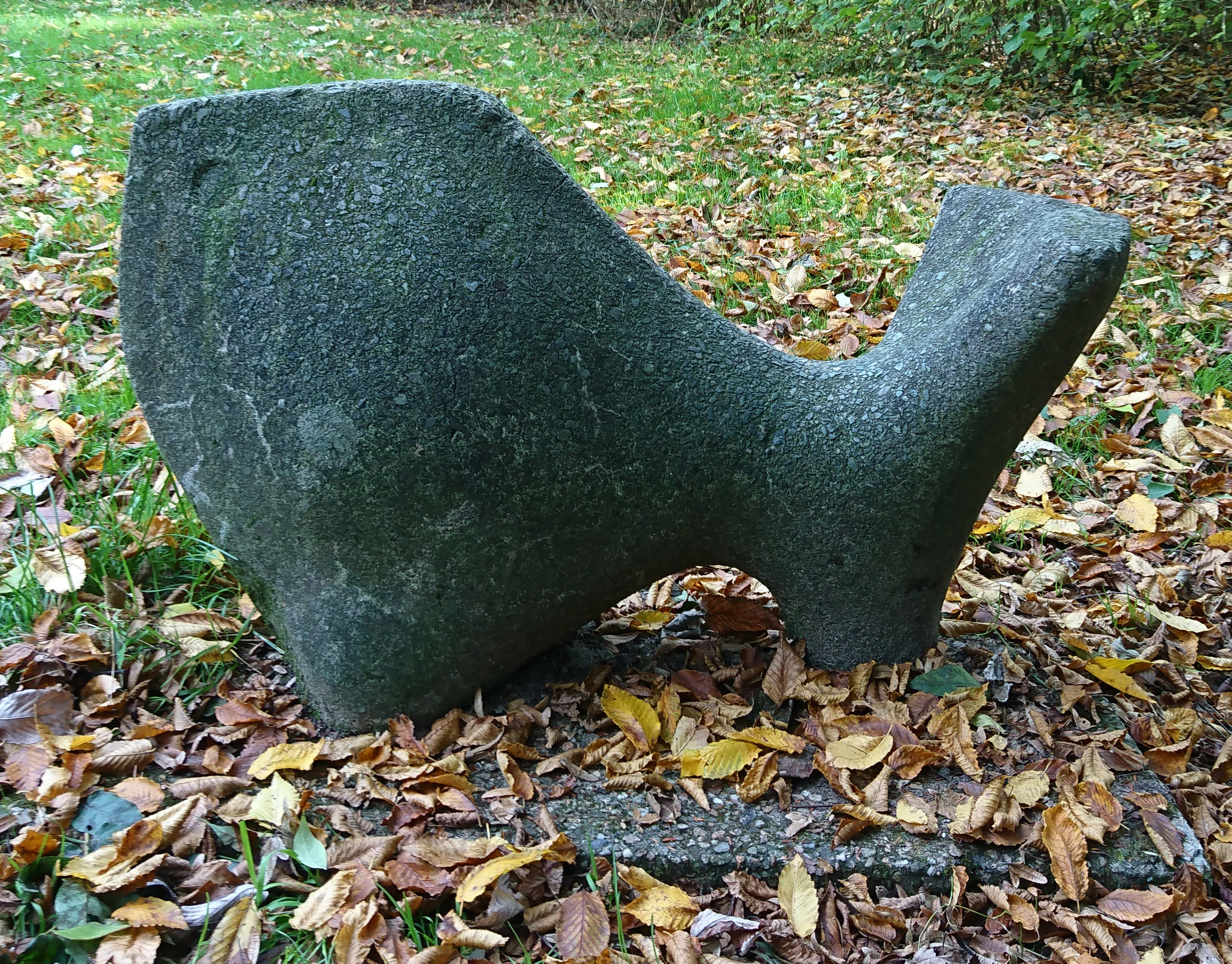 Carl Ihrke (* 18. September 1921; † 28. Februar 1983), Fisch, 1961. Stand links neben dem Haus der Jugend Eberhofweg, Eberhofstieg 22. Nun steht sie auf dem Spielplatz rechts neben dem Haus der Jugend. Eigentümer: Hansestadt Hamburg.